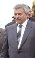 Vahid Alakbarov, Azerbaijan businessman